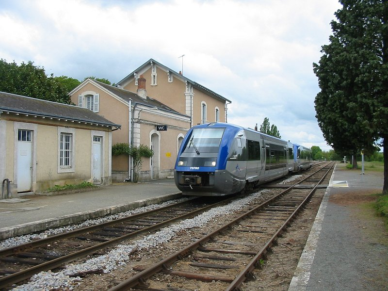 Autorails X73500 effectuant la liaison Poitiers - Limoges en gare de Lussac les Châteaux